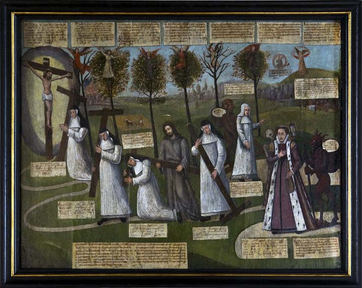 allégories de la vie religieuse